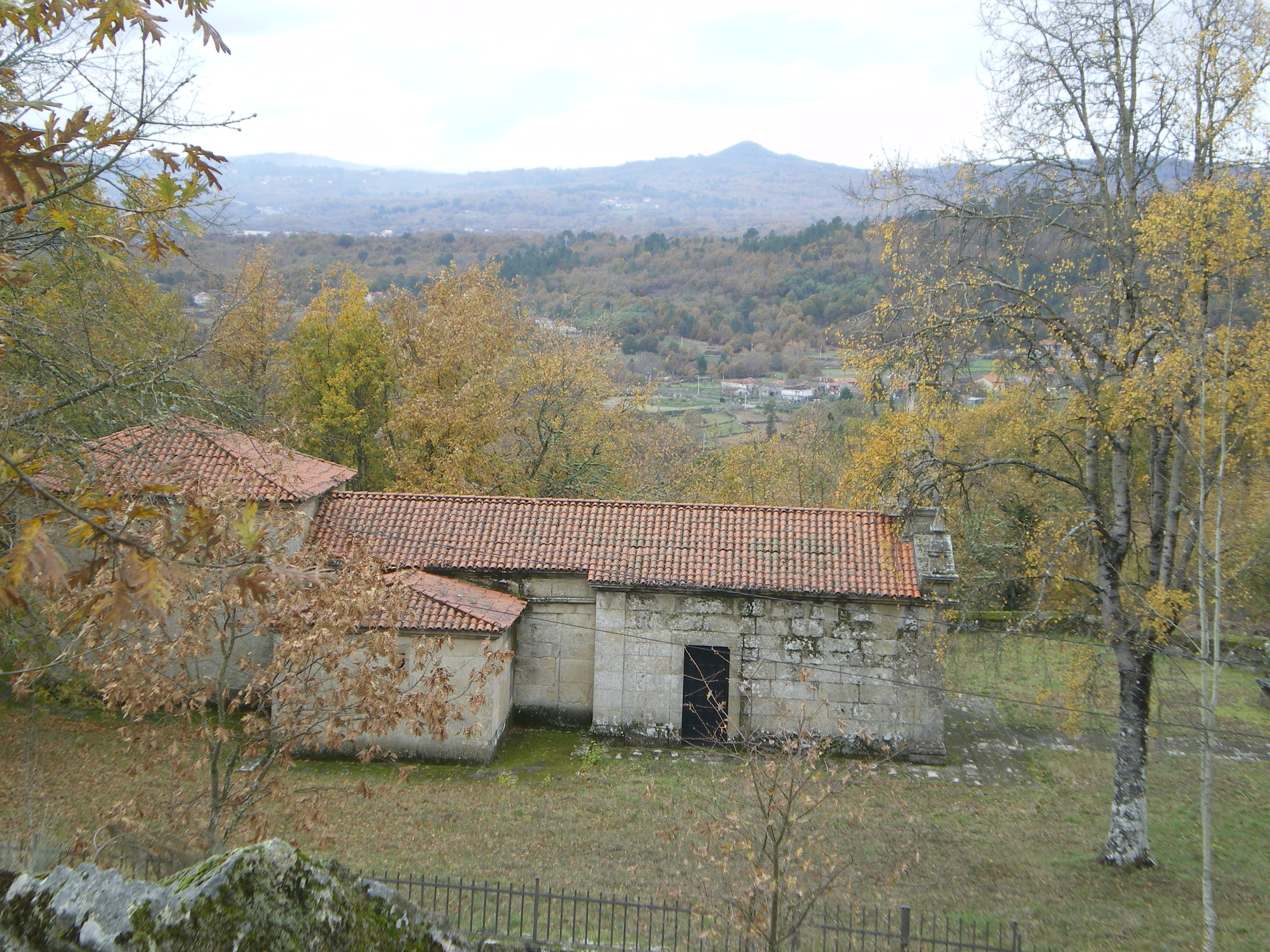 Capela do San Ramón